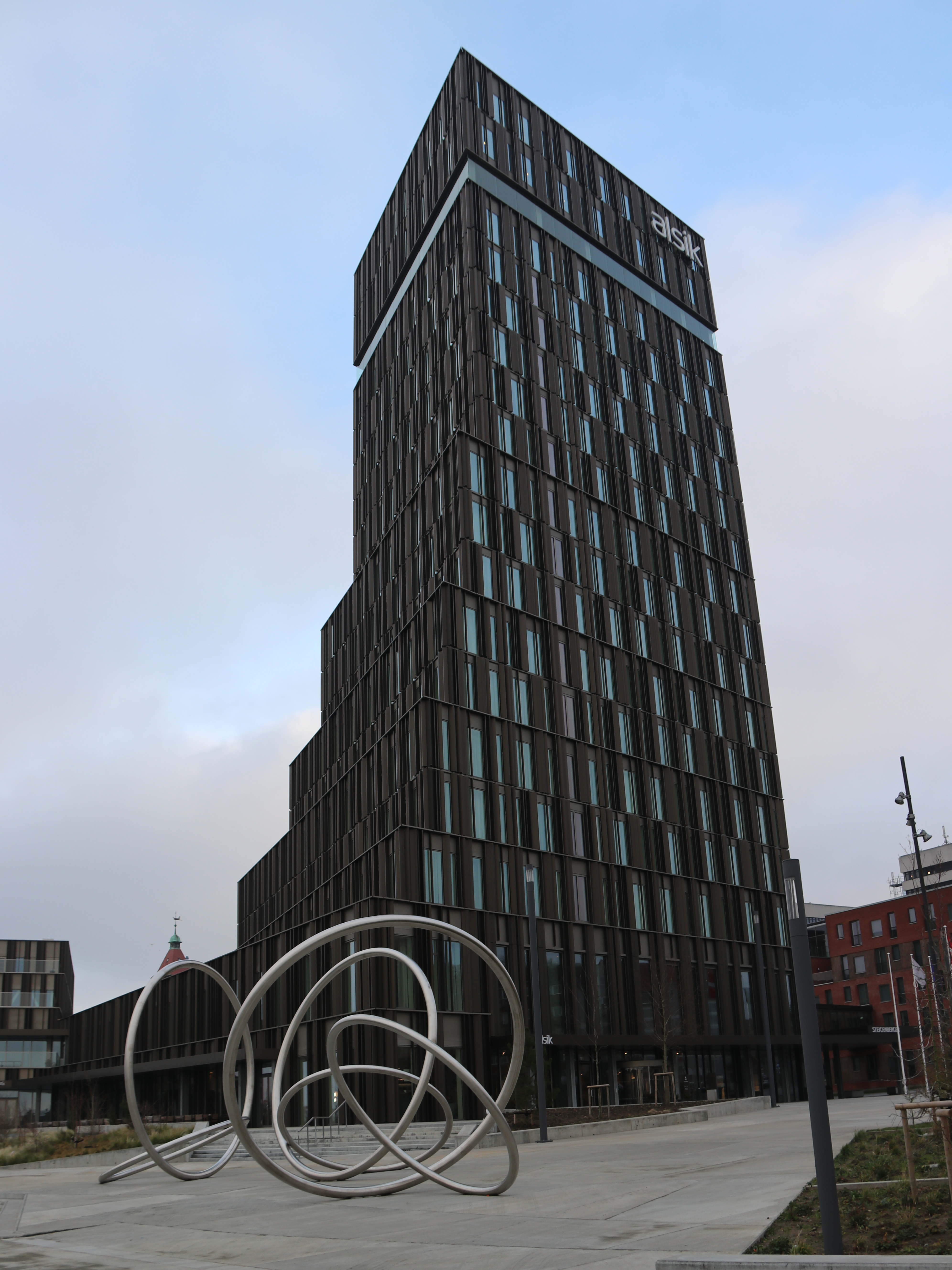 Sonderborg Hotel Alsik